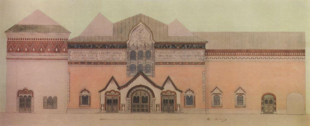 Проект фасада Третьяковской галереи